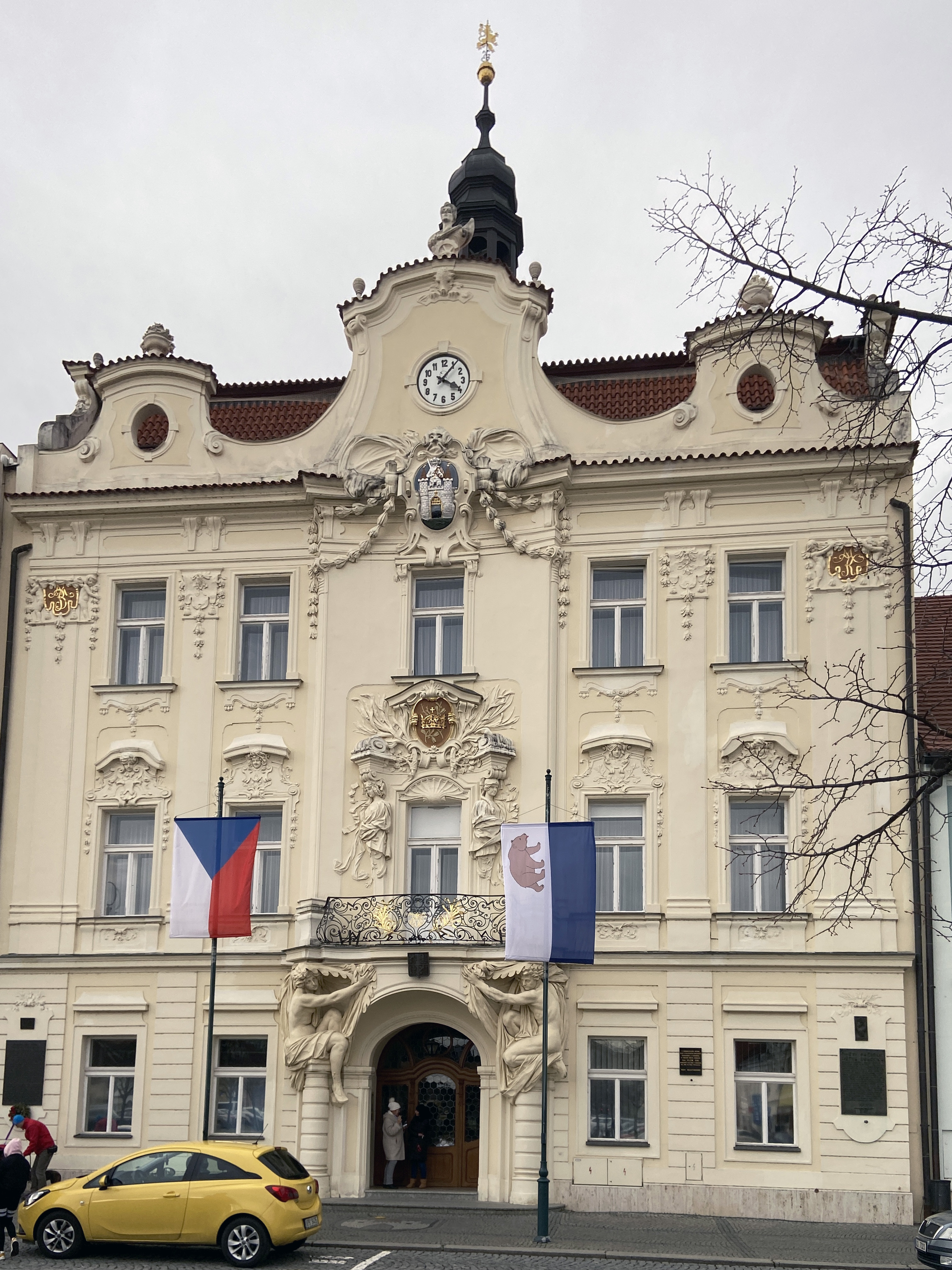 Das Rathaus mit barocken Elementen beeindruckt im Stadtzentrum